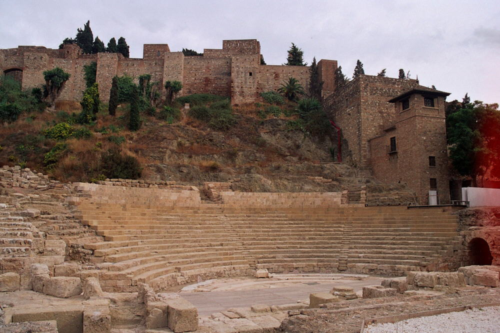 Alcazaba y Teatro romano Arabic alcazaba and roman theatre in Málaga city in Spain. Taken by JMSE in 1/10/2004 and released into the public domain.